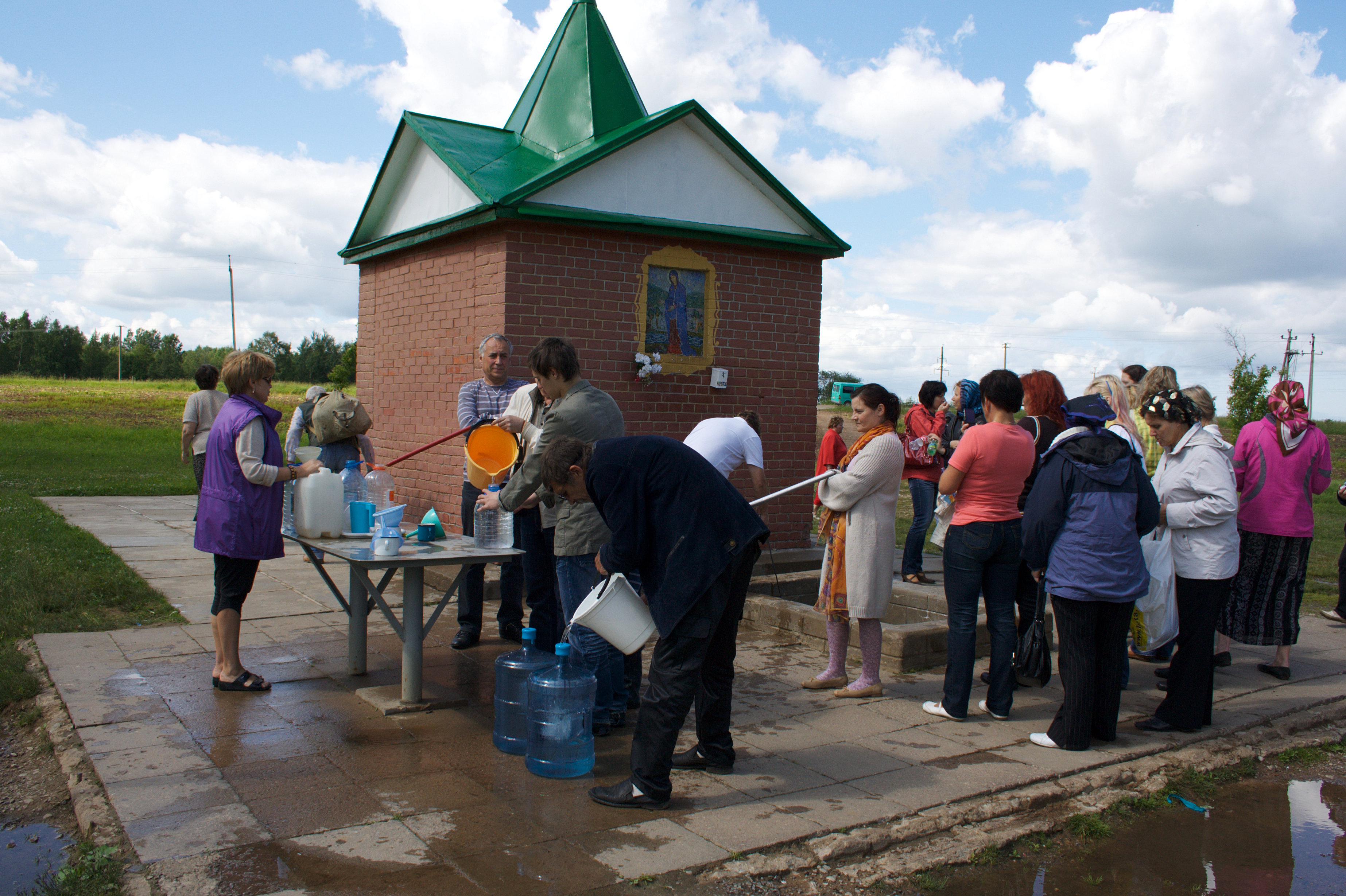 Püha allikas